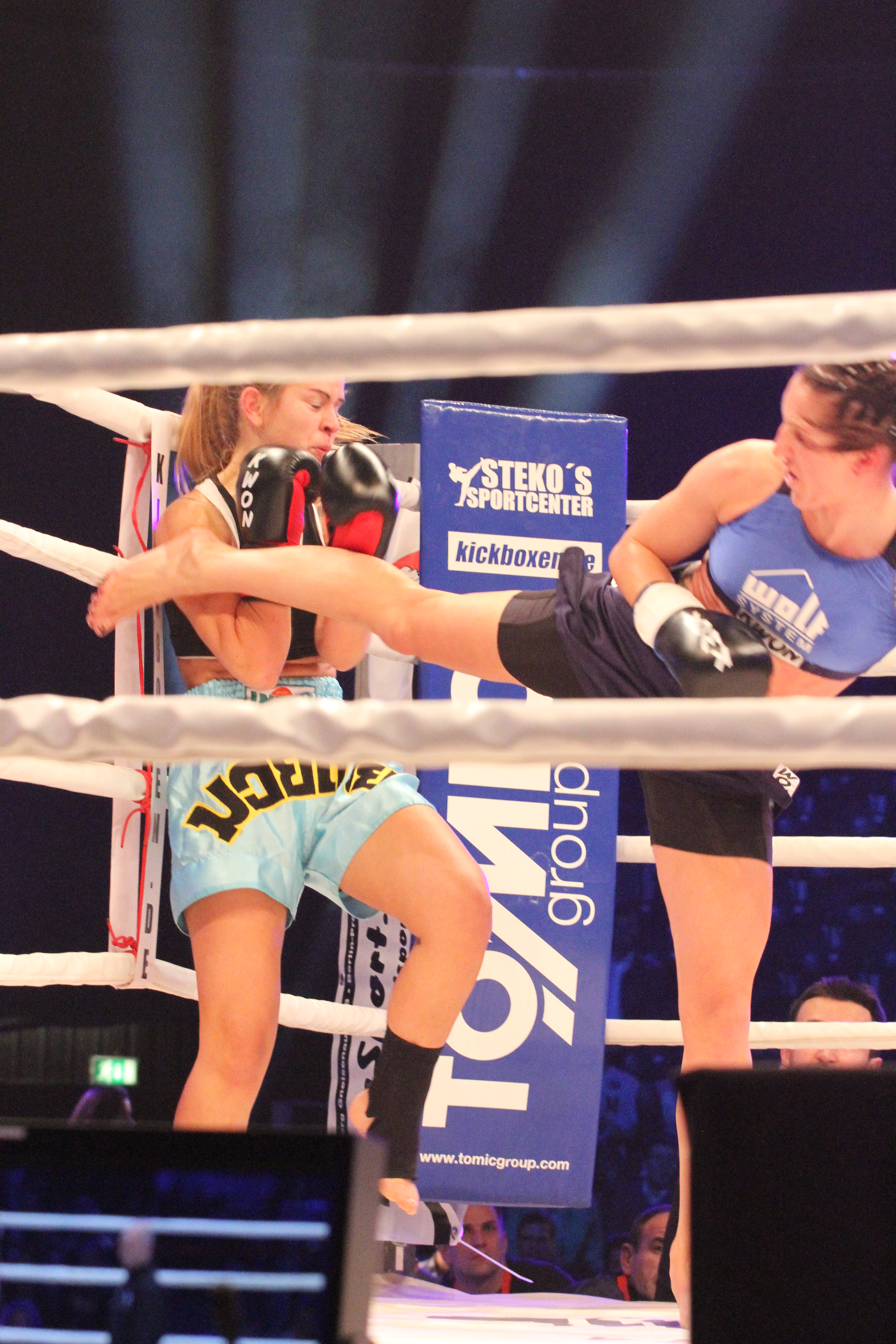 Julia Irmen WKU Weltmeisterin im Dezember 2012 in Berlin